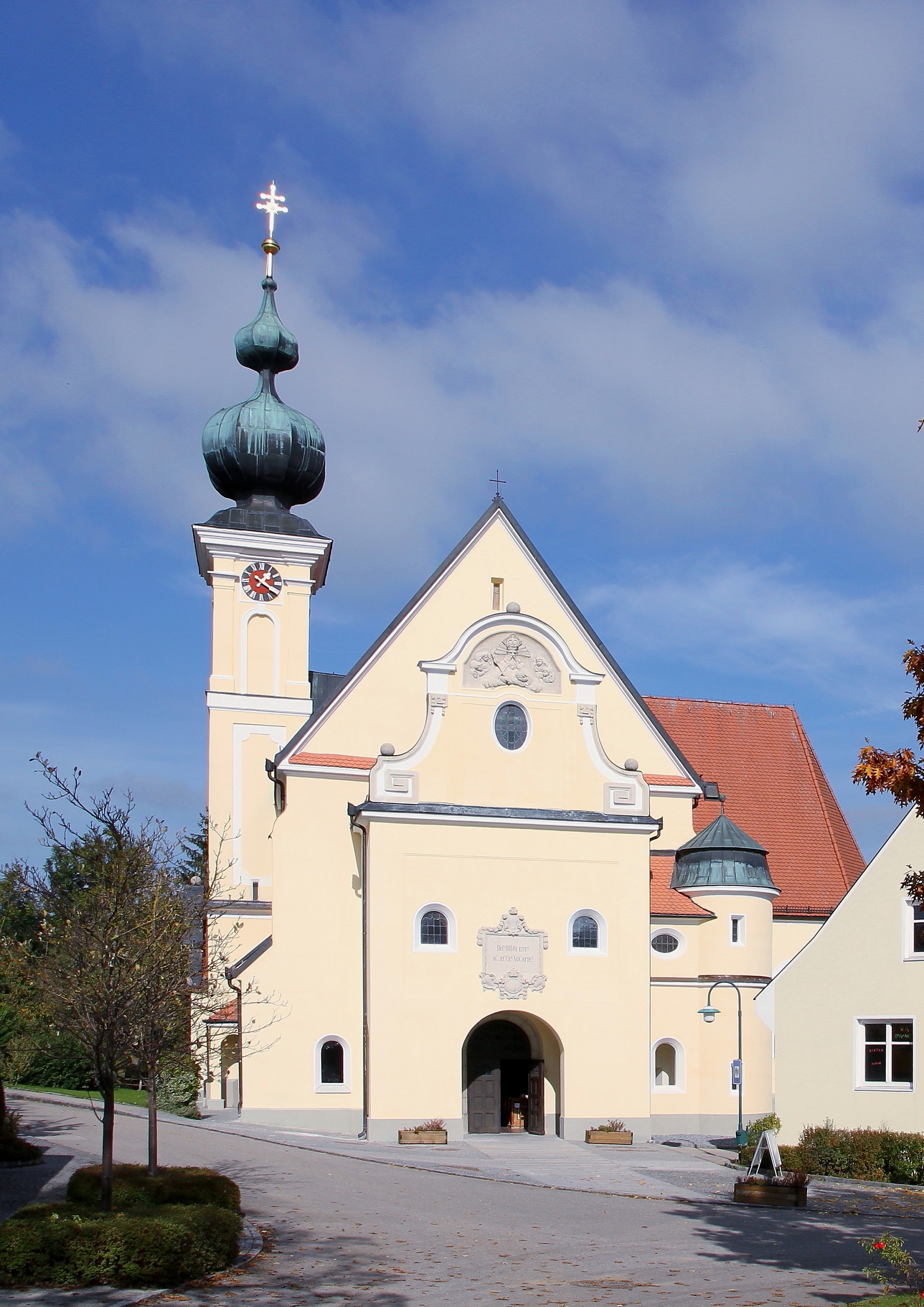 Die katholische Pfarrkirche hl. Margareta in der oberösterreichischen Gemeinde Niederthalheim. Die Kirche wurde 1913 errichtet, unter Einbeziehung des spätgotischen Chors (heute eine Seitenkapelle) und des barockisierten Westturmes der Vorgängerkirche.